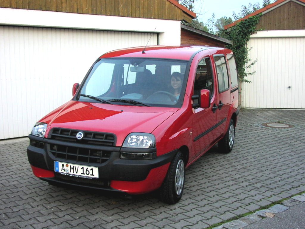 Fiat Doblò 1.6 16V, 2004.